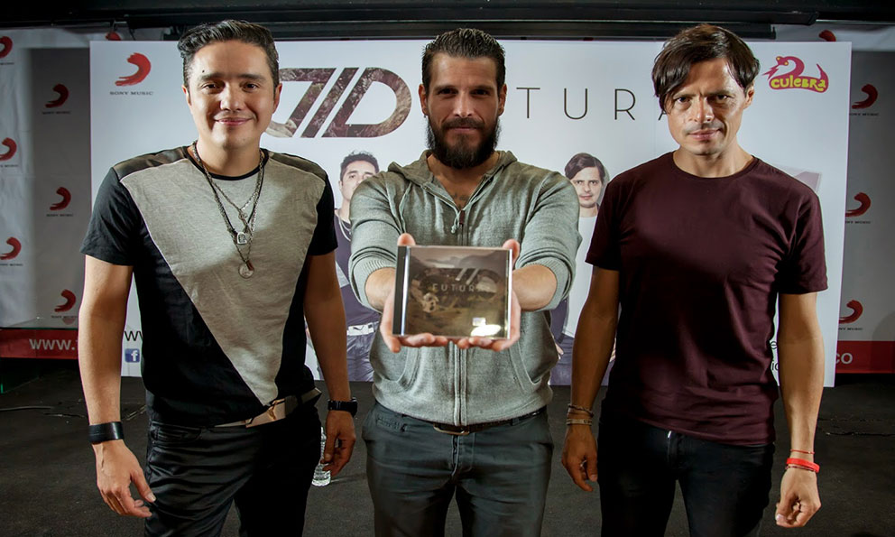 DLD presentando su sexta producción discográfica.